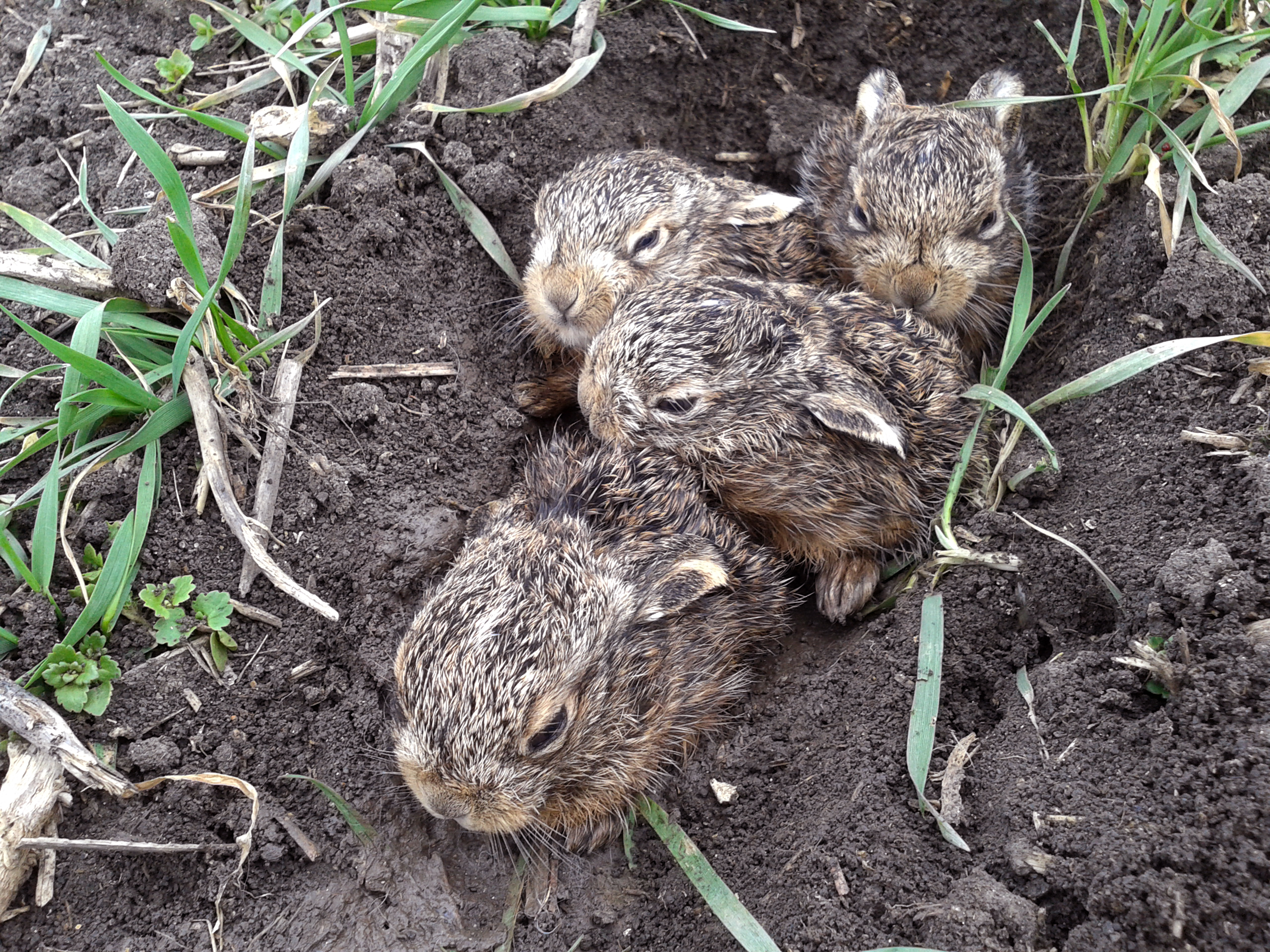 novorození zajíci polní